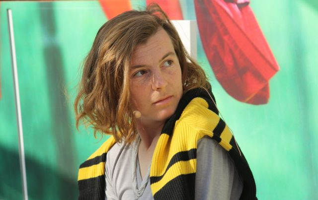 Die Schriftstellerin Ann Cotten bei der Buchvorstellung von "Der schaudernde Fächer" am Arte-Stand auf der Leipziger Buchmesse 2014